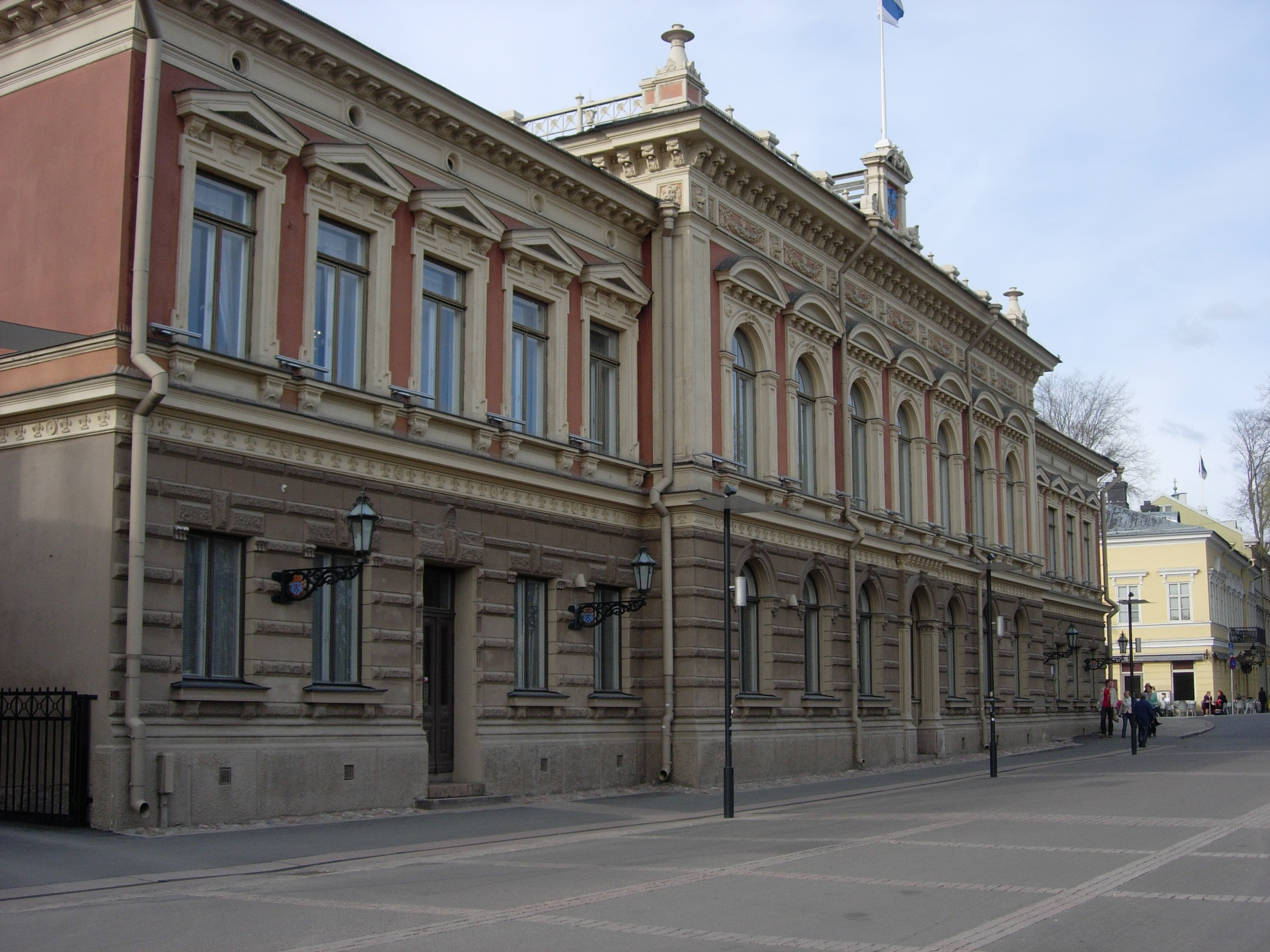 Turku city hall